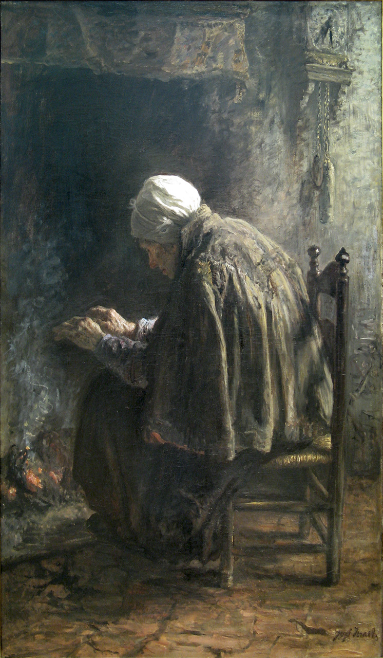 Als men oud wordt / Jozef Israëls (1824 - 1911). - circa 1883, 0331824 Jozef Israëls (1824-1911) circa 1883